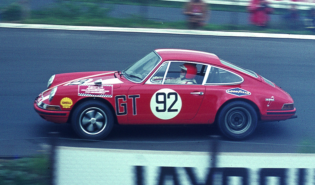 Porsche 911 L von Georg Loos/Franz Pesch beim 1000-km-Rennen 1970 auf dem Nürburgring eingangs Südkehre, Achtzehnte im Gesamtklassement und Sieger der GT-Klasse bis 2 Liter Hubraum. 36 Runden in 6:06:48,200 Stunden